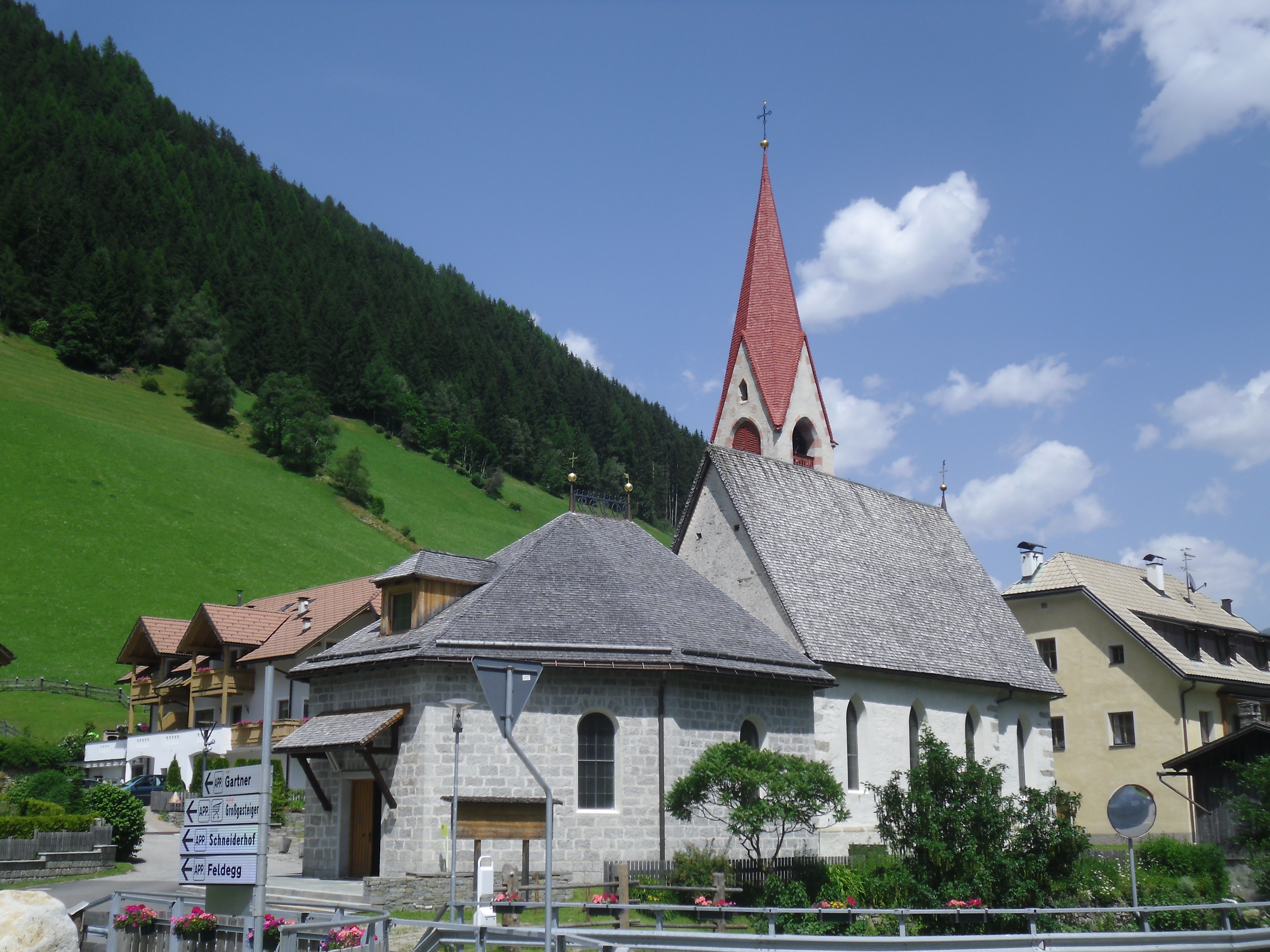 Pfarrkirche St. Jakob in Weißenbach in Südtirol